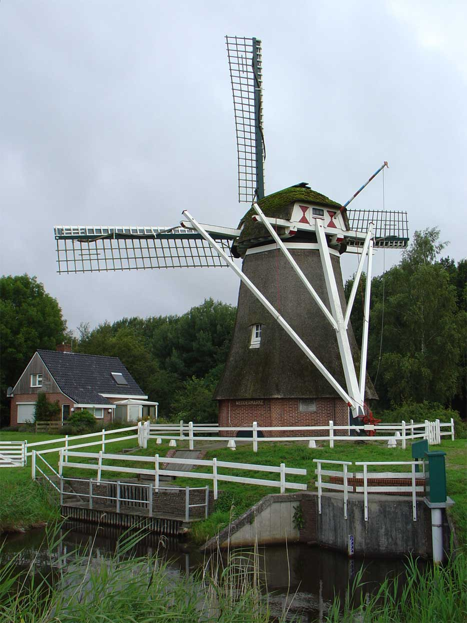 Molen de Weddermarke nabij de Wedderbergen